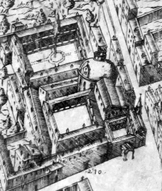 Pianta del buonsignori, dettaglio 210 la nunziata (ss. annunziata)